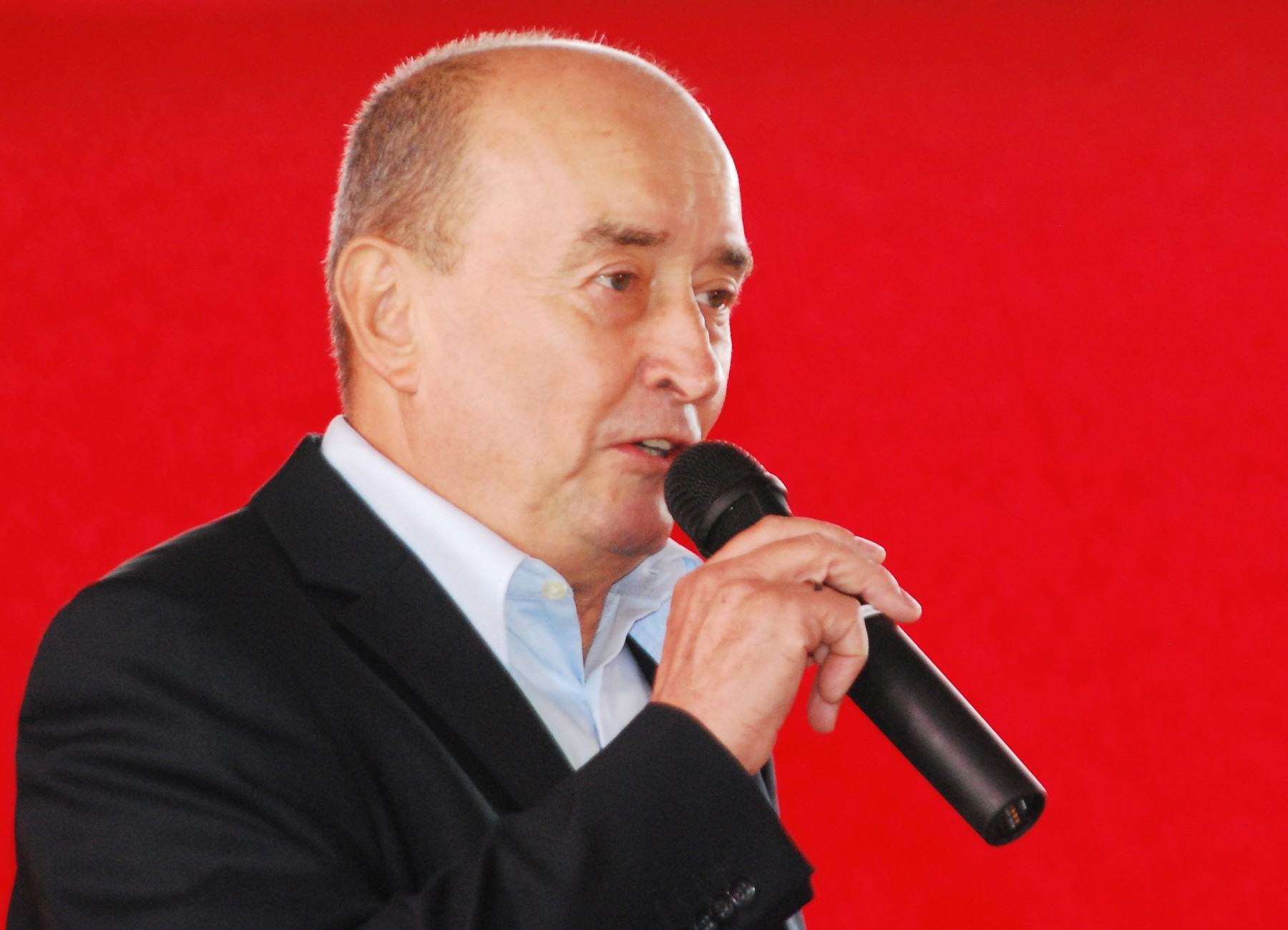 Franz Ekkamp anlässlich des Wiener Tramwaytages in der Spettergarage der Wiener Linien in Wien-Ottakring